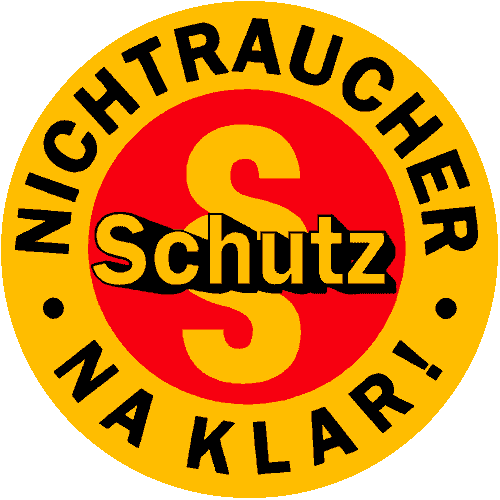 Aufkleber "Nichtraucherschutzgesetz na klar!"